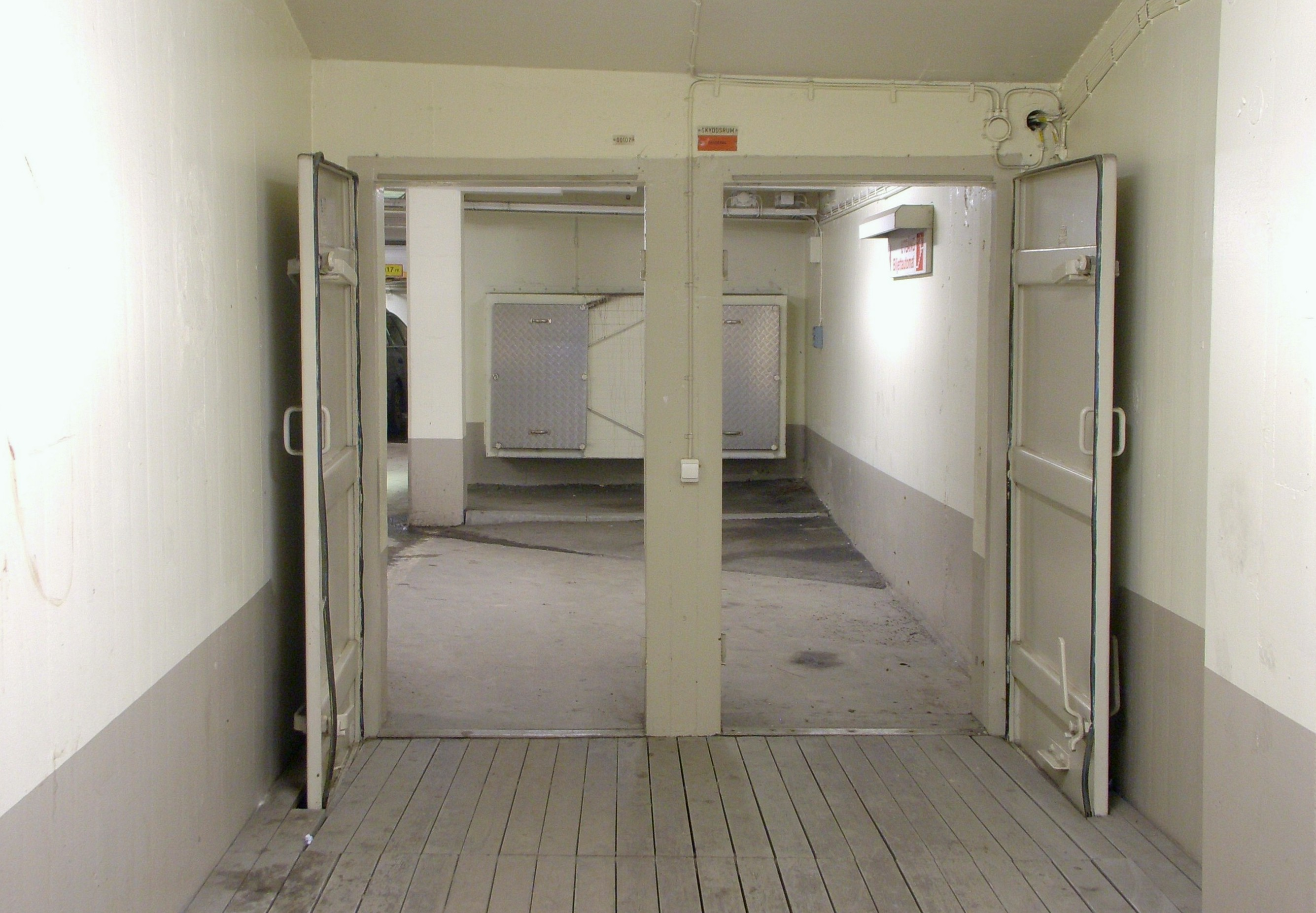 Konserthusgaraget/Skyddsrummet Hötorget i Stockholm, luftsluss, gasfång